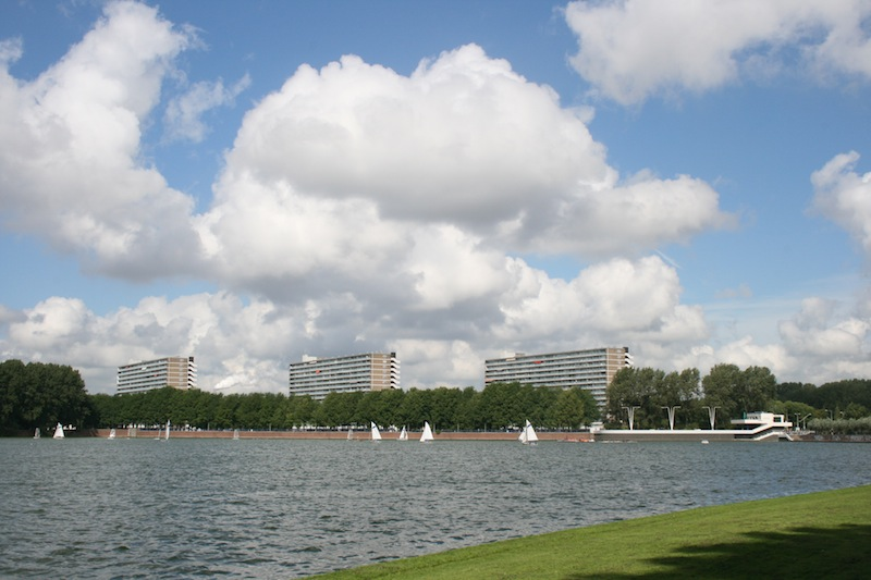 Sloterplas met flats aan de Noordzijde. Foto: Erik Swierstra.